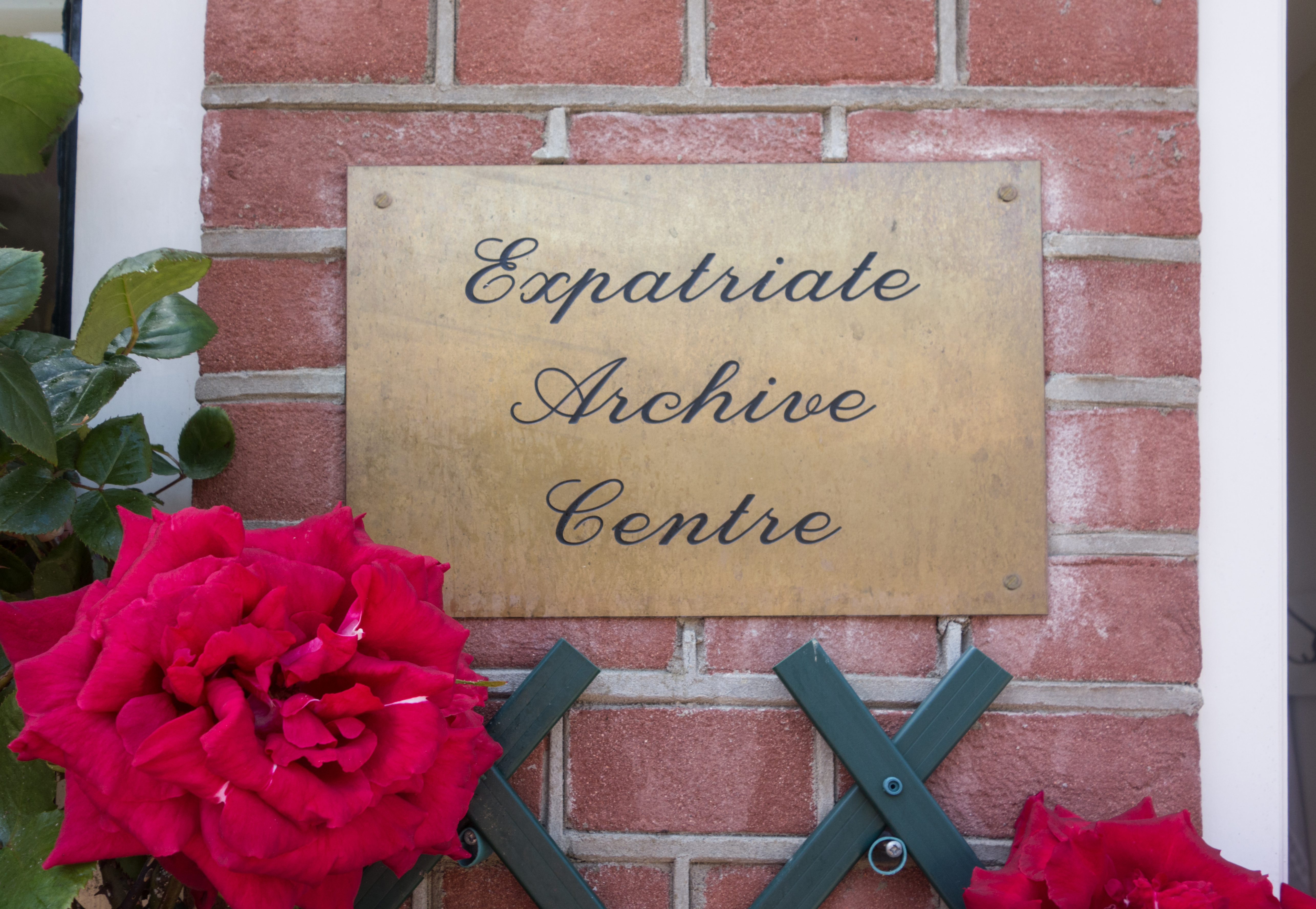 Naambordje Expatriate Archive Centre